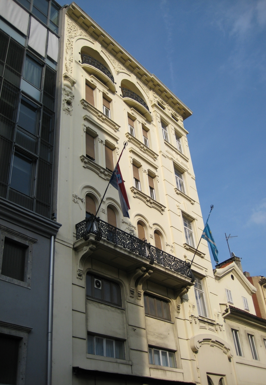 Zgrada Primorsko-goranske županije u Rijeci